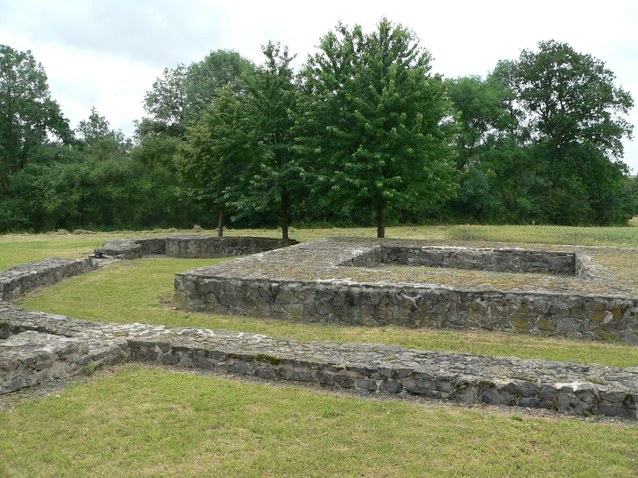 Grundmauer des Bergfrieds der Ruine Burg Arnsburg, Hessen, Deutschland.